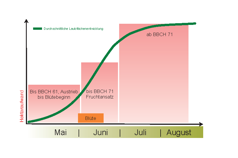 Grafische Darstellung vom Hektaraufwand eines Pflanzenschutzmittels nach Entwicklungsstufen während der Vegetationszeit der Weinrebe.